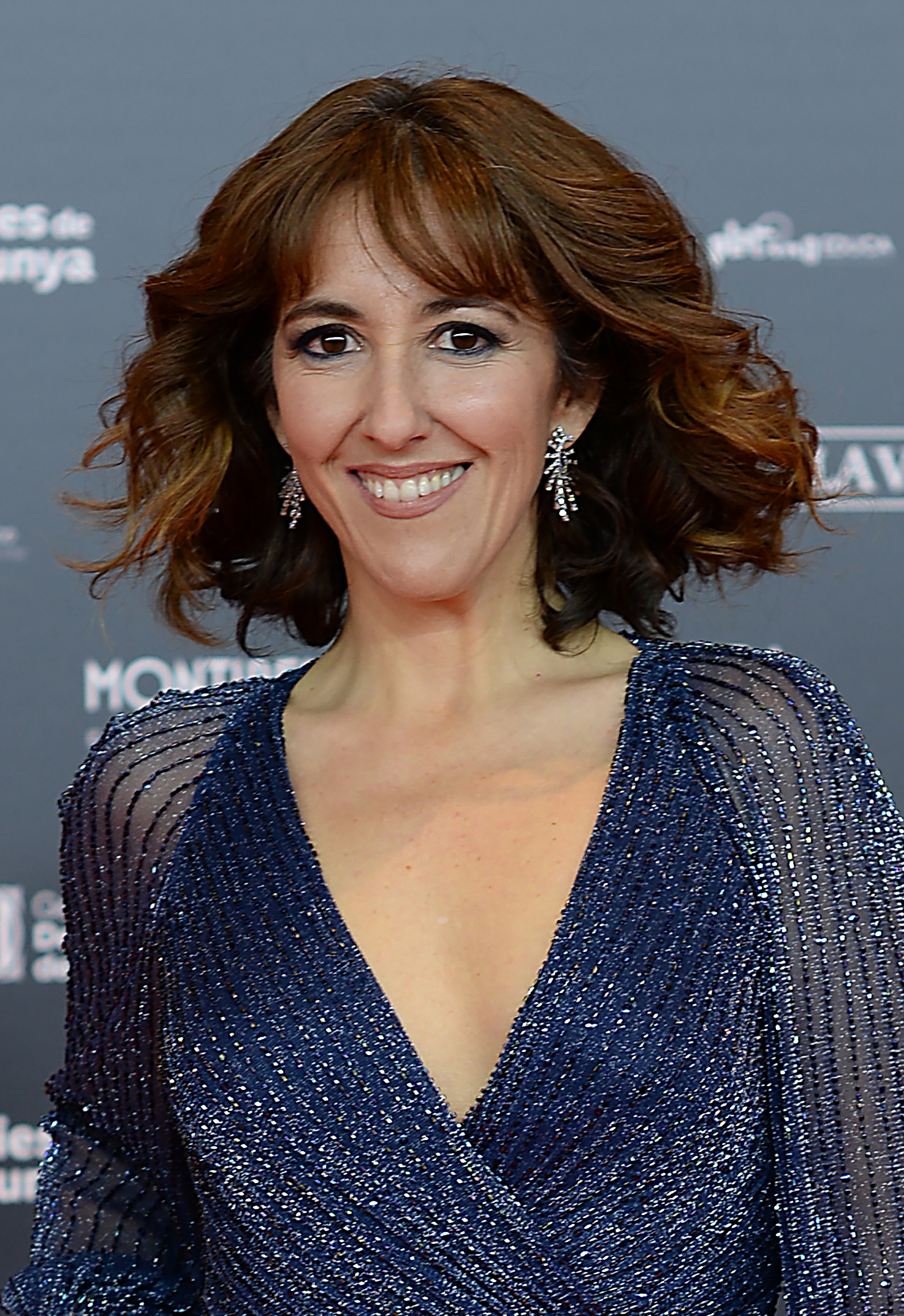 Betsy Túrnez, actriu, XII Premis Gaudí (2020)